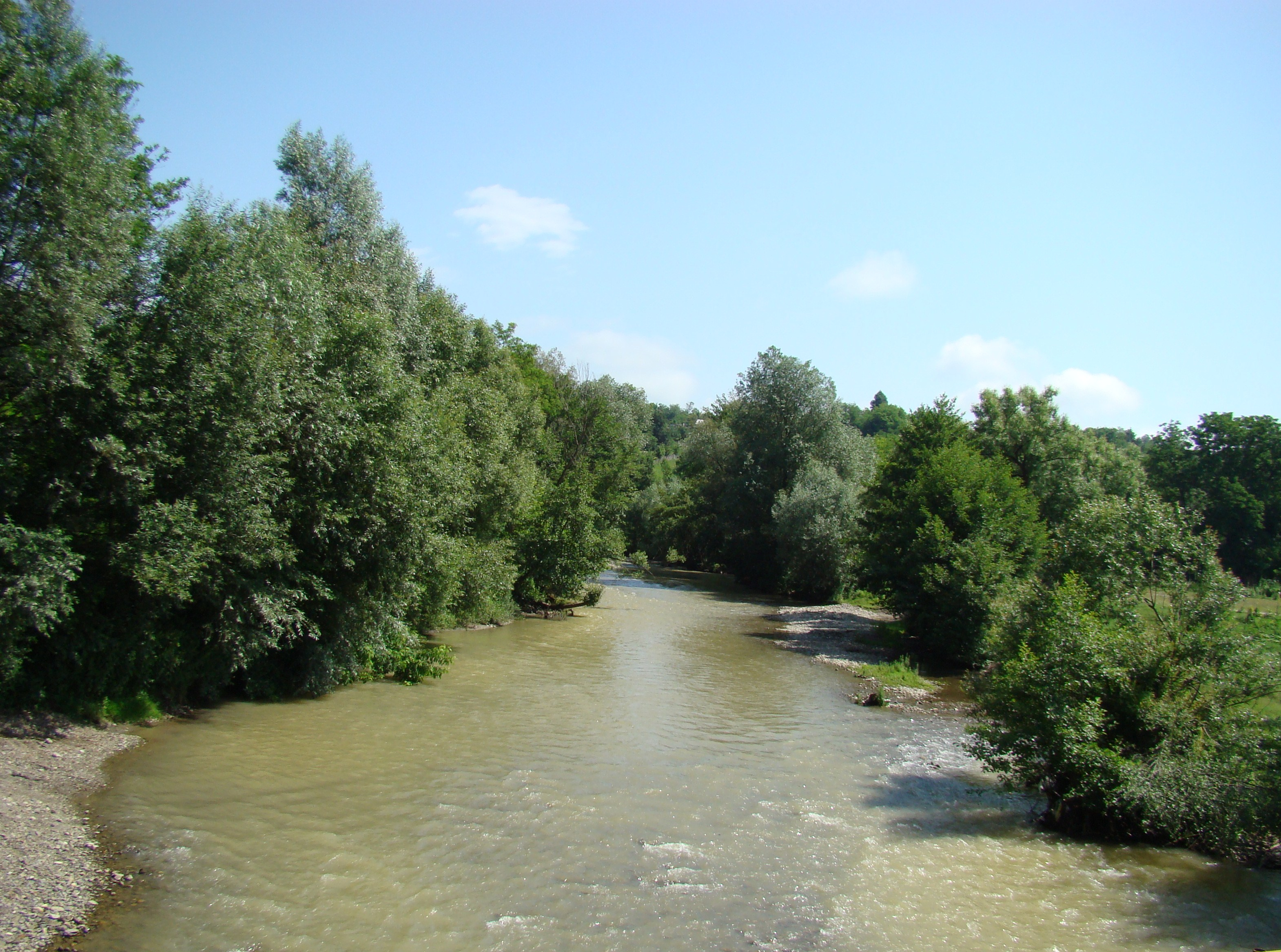 Râul Motru la Negoiești